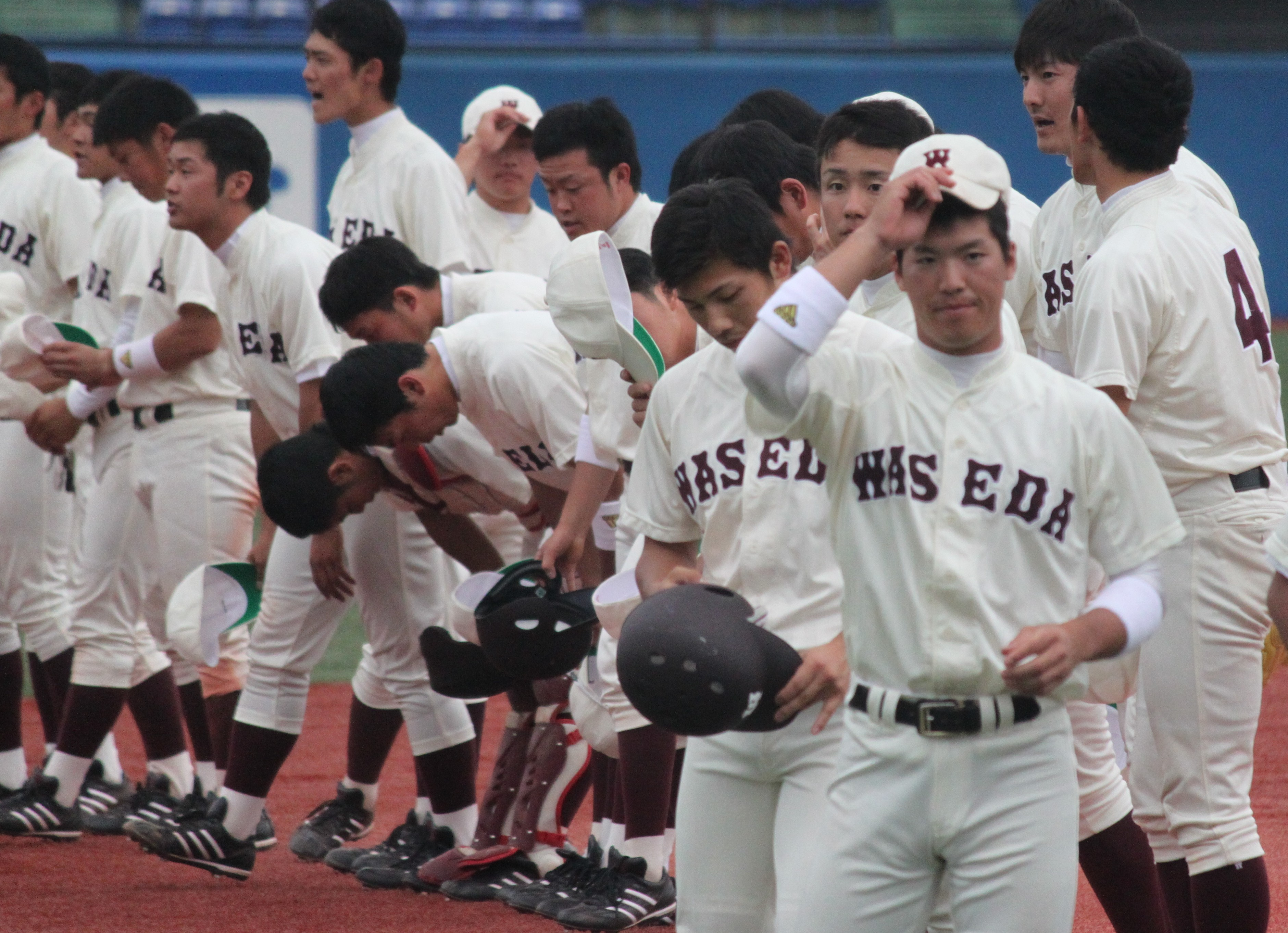 早稲田大学野球部